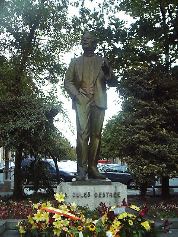 Statue en bronze de Jules Destrée. Sculpture par Alphonse Darville (1910-1990) située au Boulevard Audent à Charleroi.